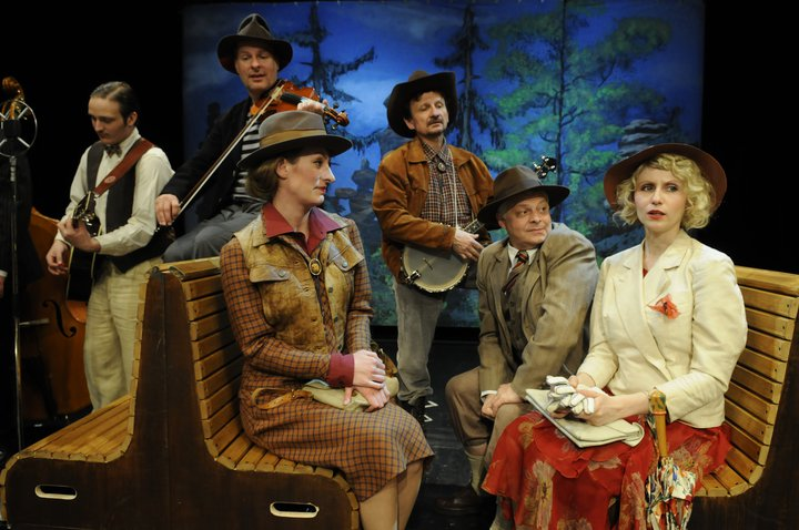 Snímek z inscenace "Zločin v Posázavském Pacifiku" autorů Martina Vačkáře a Ondřeje Havelky v režii Ondřeje Havelky. Inscenace vznikla v koprodukci Městského divadla Mladá Boleslav a Divadla Kalich. Na snímku Vojtěch Havelka, Martin Zbrožek, Anna Polívková, Miroslav Babuský, Bohumil Klepl a Petra Nakládalová.